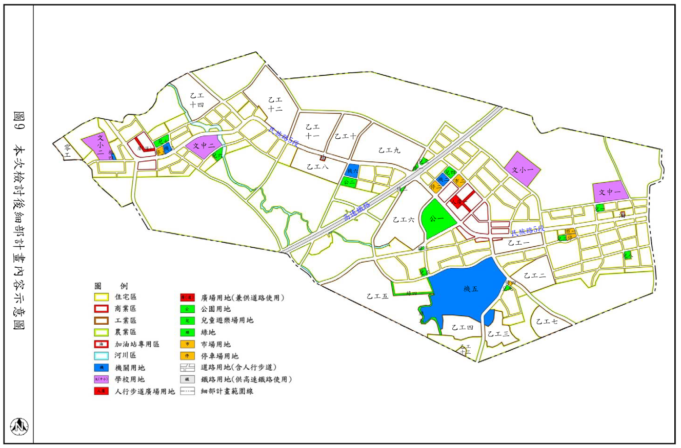 「變更中壢、楊梅、新屋、觀音(四行政轄區交界處)主要計畫(第三次通盤檢討)案」及「變更中壢、楊梅、新屋、觀音(四行政轄區交界處)細部計畫(第一次通盤檢討)案」10209四鄉鎮三通細部計畫書.pdf